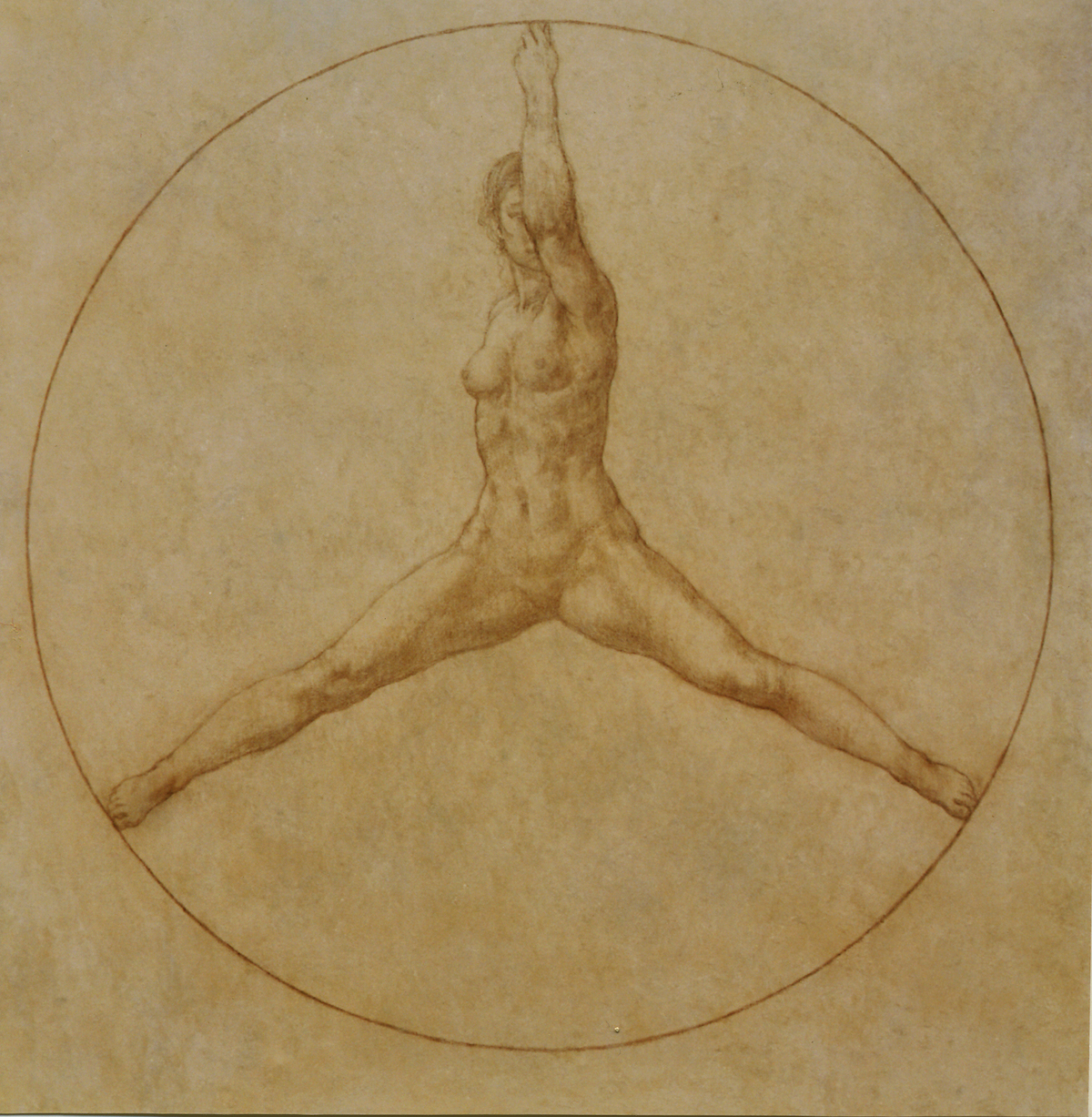 В. Колесников. Мерседес. 130Х125, 2003